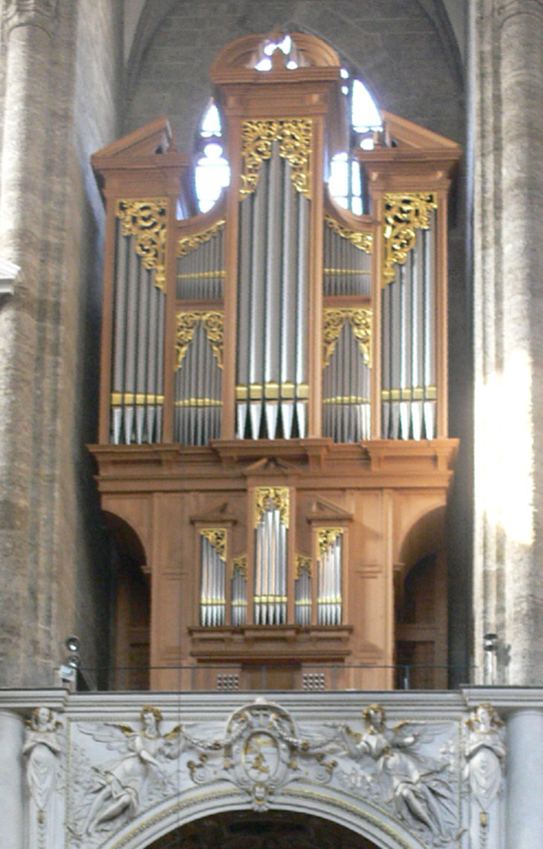 Franziskanerkirche Unserer Lieben Frau, Salzburg Marien-Orgel (Metzler-Orgelbau AG, Dietikon, op. 559, erbaut 1989), siehe auch [1]